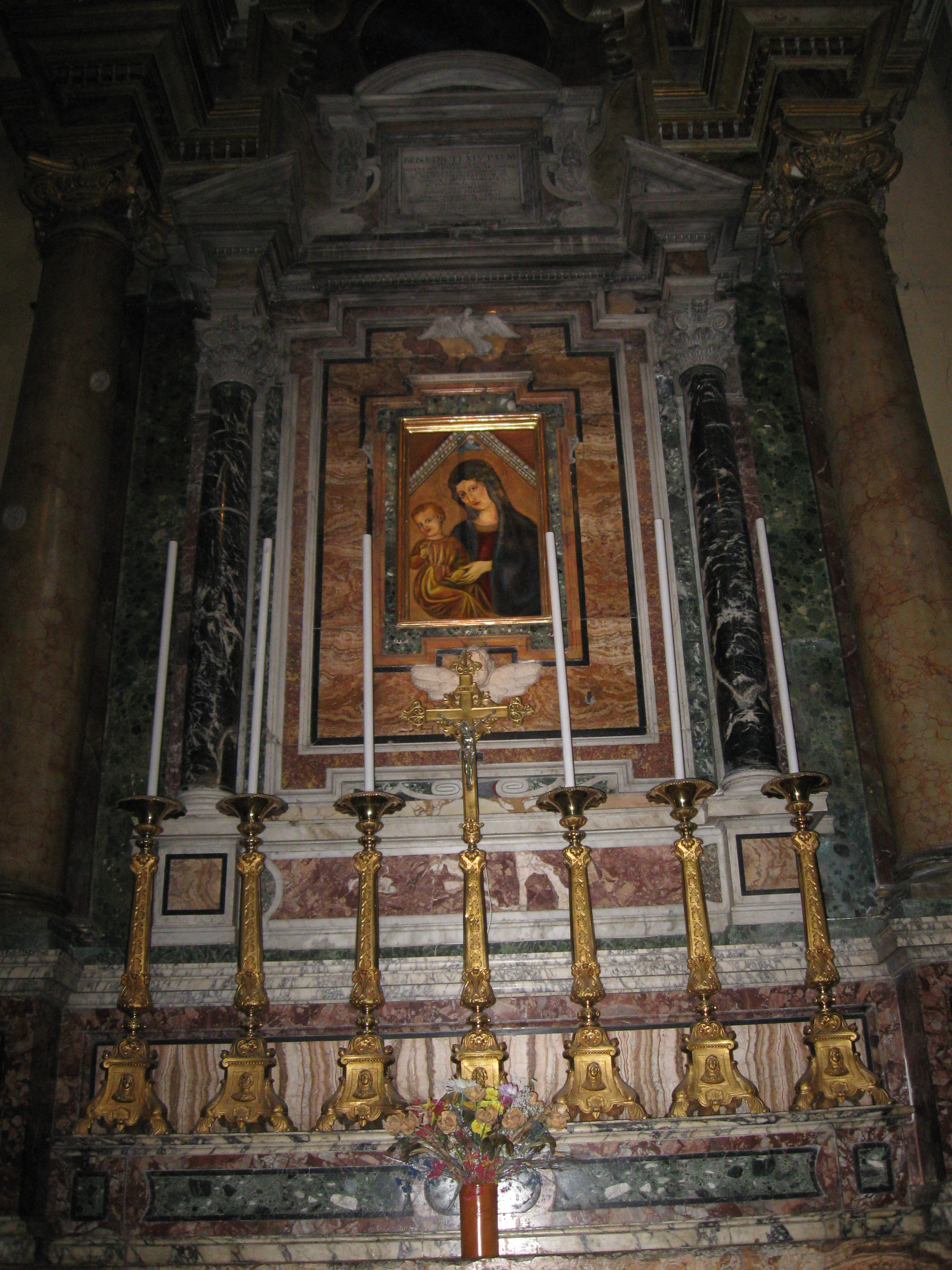 Icona della Madonna del Popolo conservata nella Basilica di San Barnaba a Marino (RM)